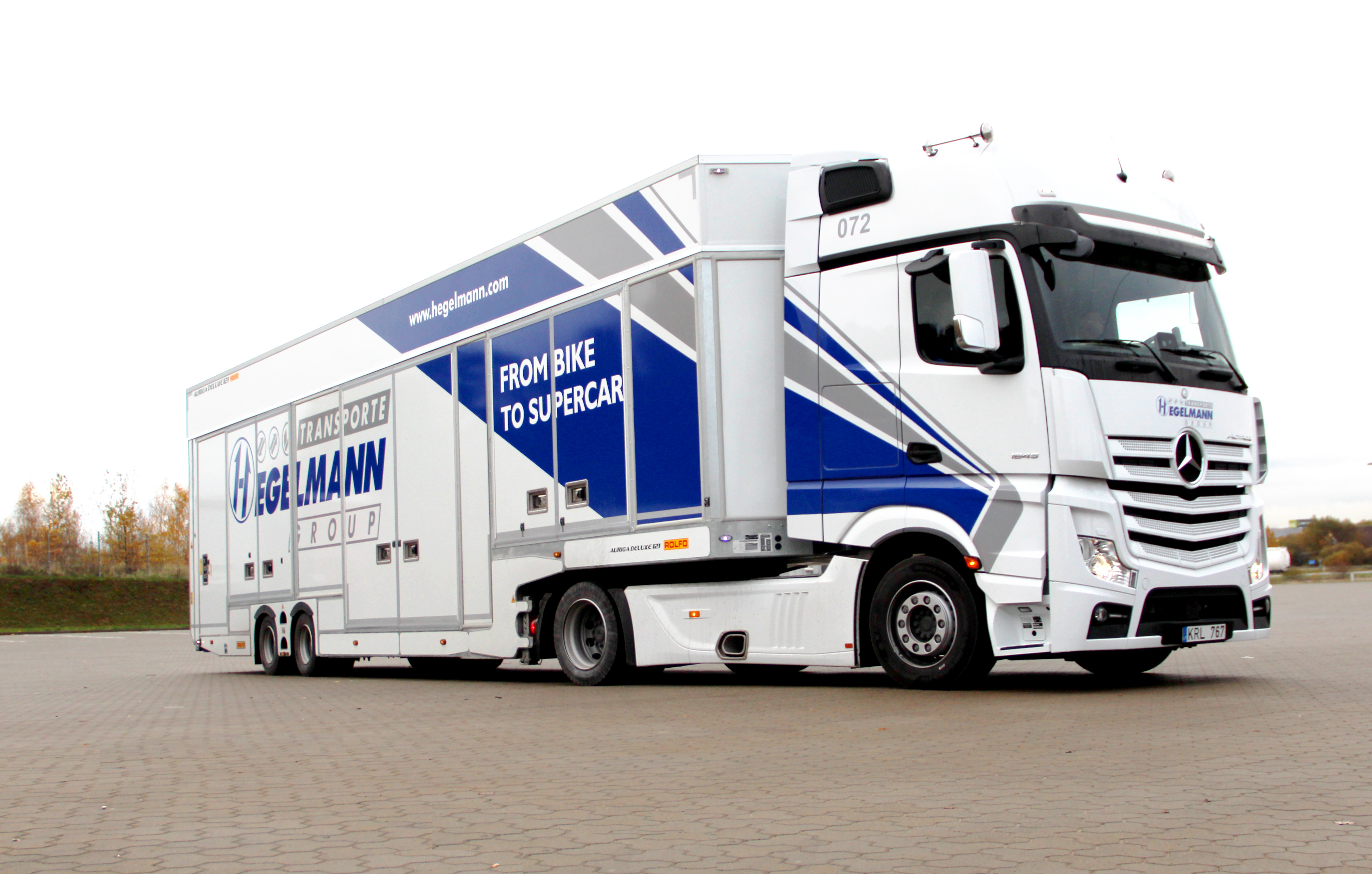 Sonder Auto Transporter